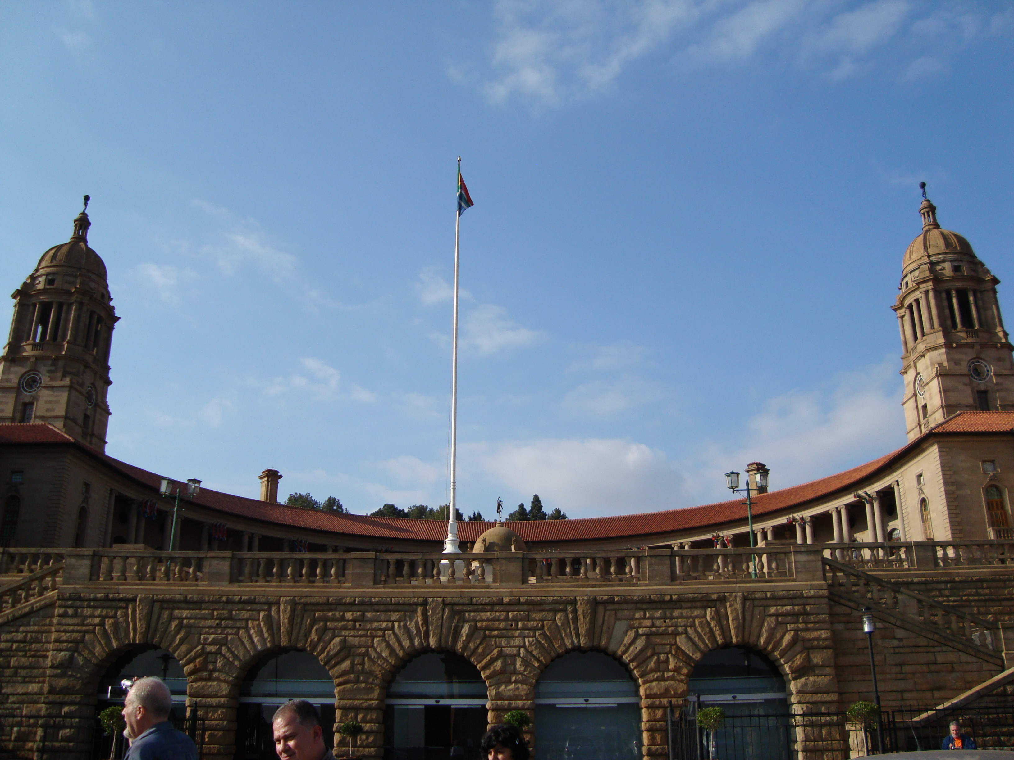 Horlosietorings en rotonde van die Uniegebou, Pretoria. In die middel die vlagpaal op die sentrale balustrade waar die landsvlag sedert 1985 gehys word, asook die Hermesbeeld op die koepelrostrum.